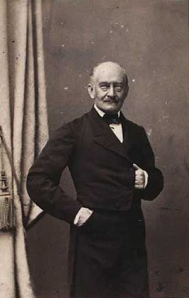 Herman Frederik Løvenskiold (1805-1877), Danish Baron and estate owner